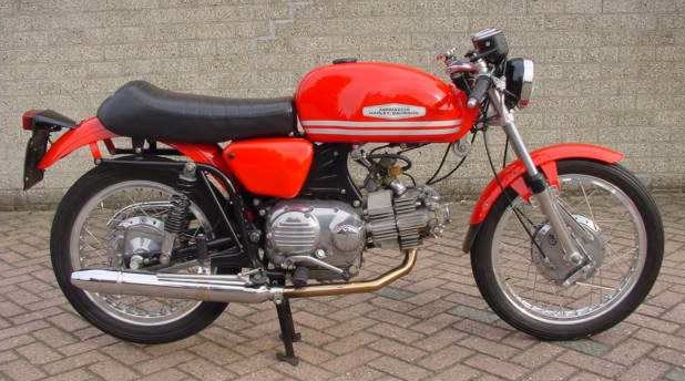 Toestemming van Yesterdays Antique Motorcycles (